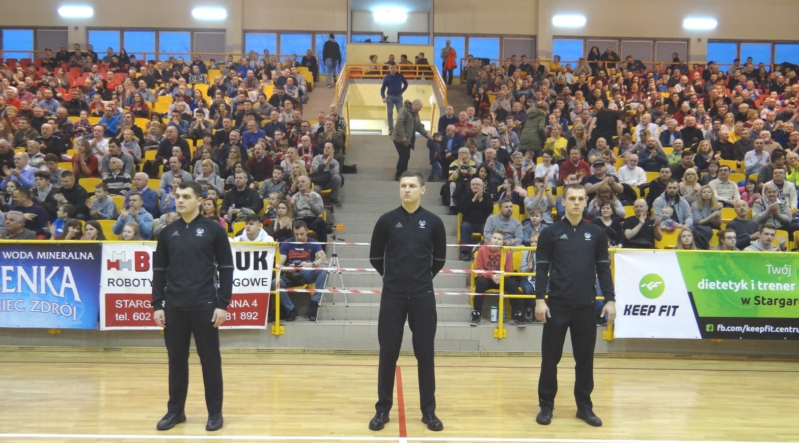 Sędziowie meczu Spójnia z KK Warszawa (2018)